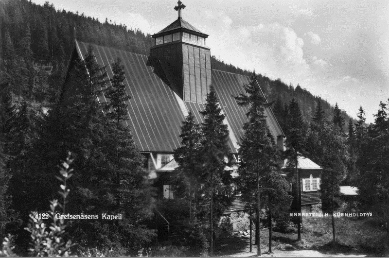 Grefsenåsen kapell i Grefsenkollveien, Oslo. Oppført som Kirkens hus til Jubileumsutstillingen i 1914 og flyttet til Grefsen hvor det fungerte som kapell i 1916-1959. Arkitekt var Harald Aars.